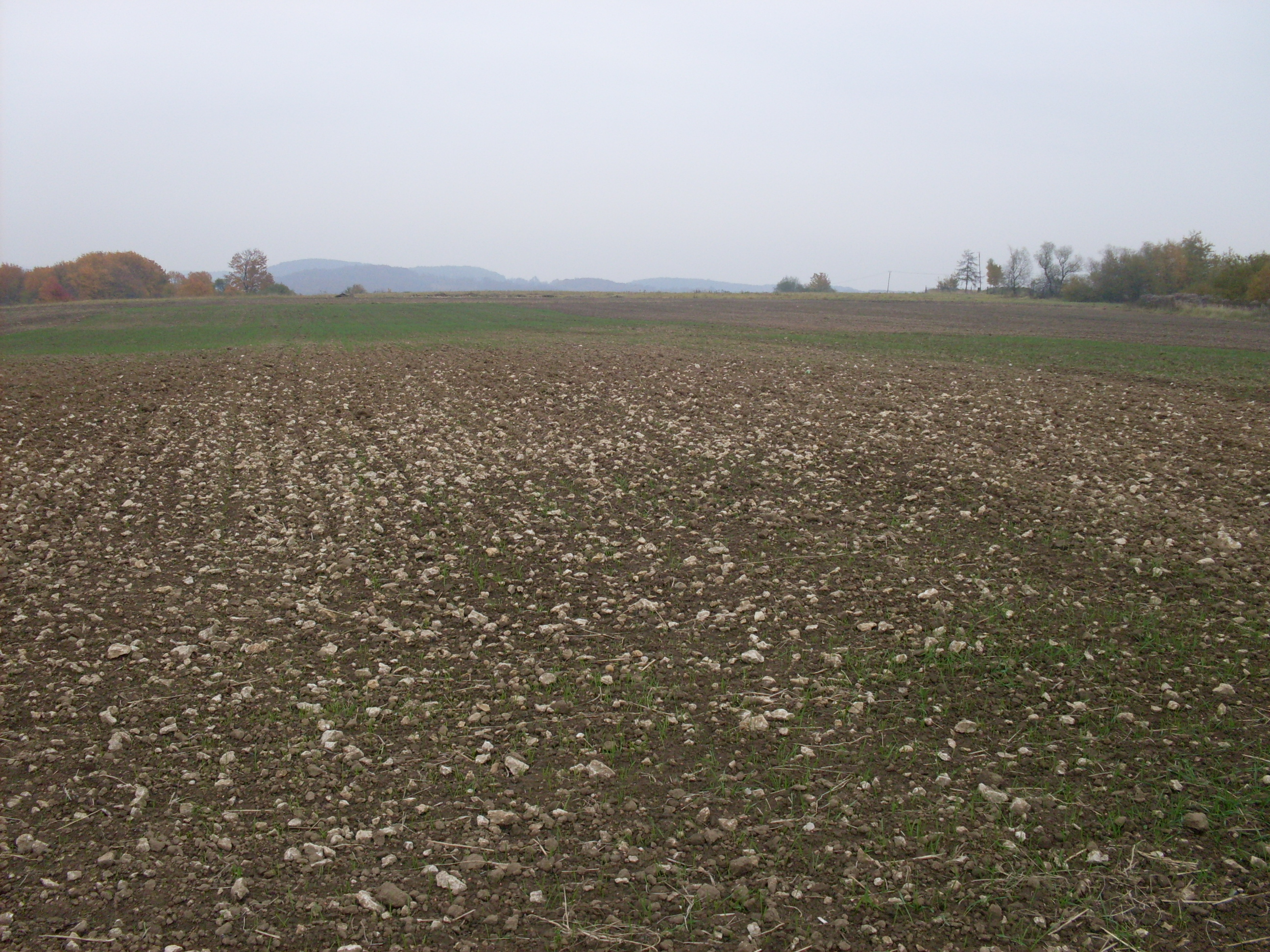 Paczółtowice.Biała Góra.